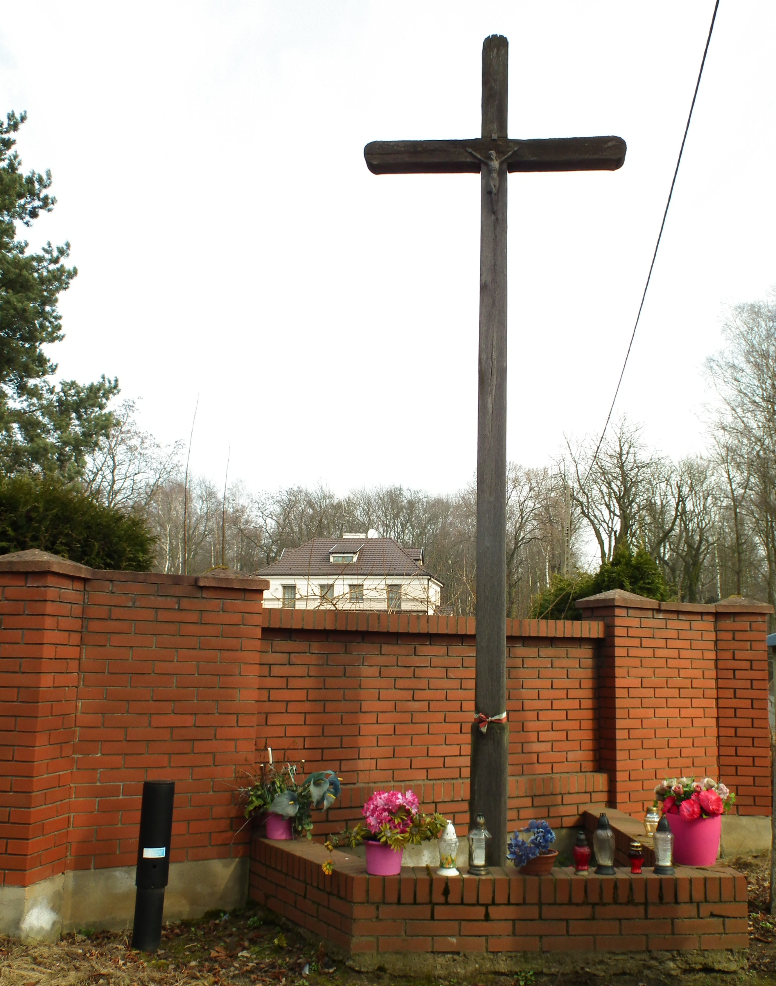 Willa Józefa Kostrzewskiego w Poznaniu na ul. Biskupińskiej. Krzyż dziękczynny.